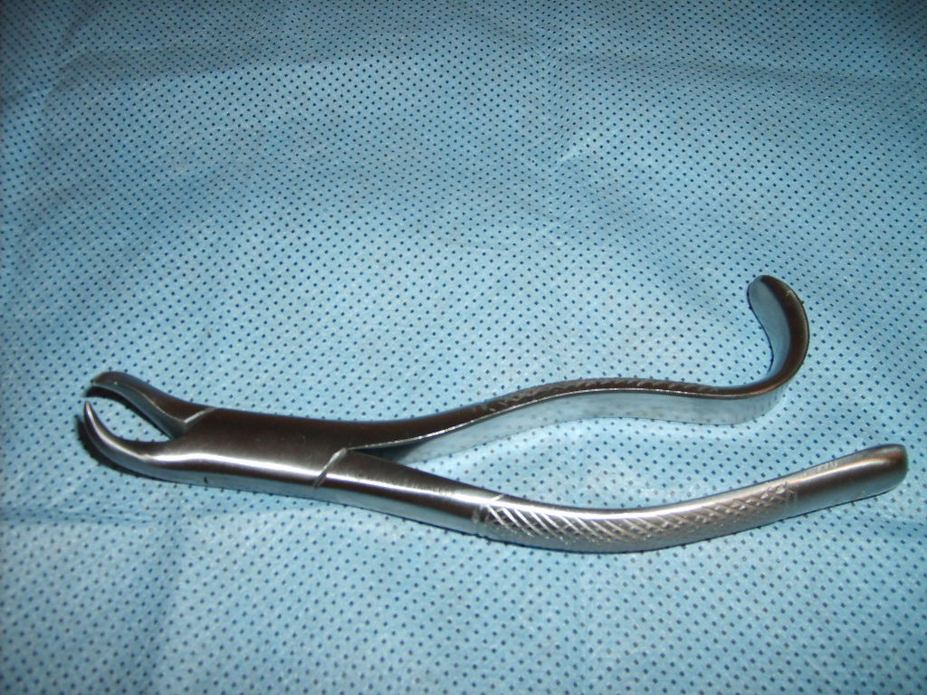 Fórceps n. 16 - utilizado em odontologia